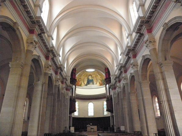 Intérieur de l'église N.D. St-Louis de la Guillotière (Lyon 7ème)